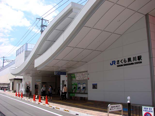 さくら夙川駅正面